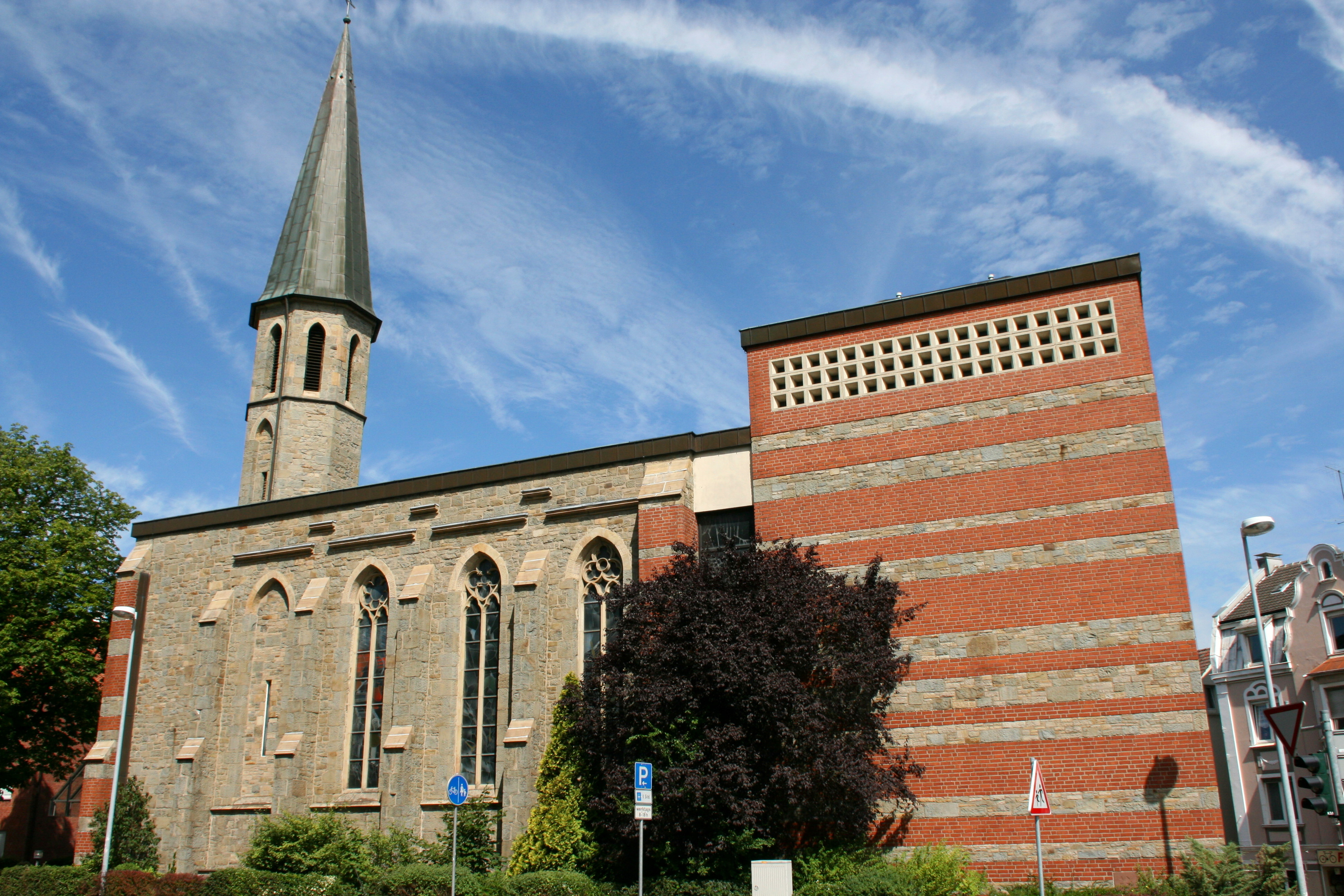 St.-Engelbert-Kirche an der Rosendahler Straße in Gevelsberg